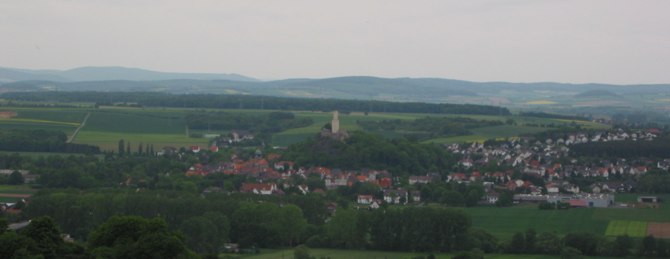 Blick von der Burg Heiligenberg auf Felsberg (Hessen)